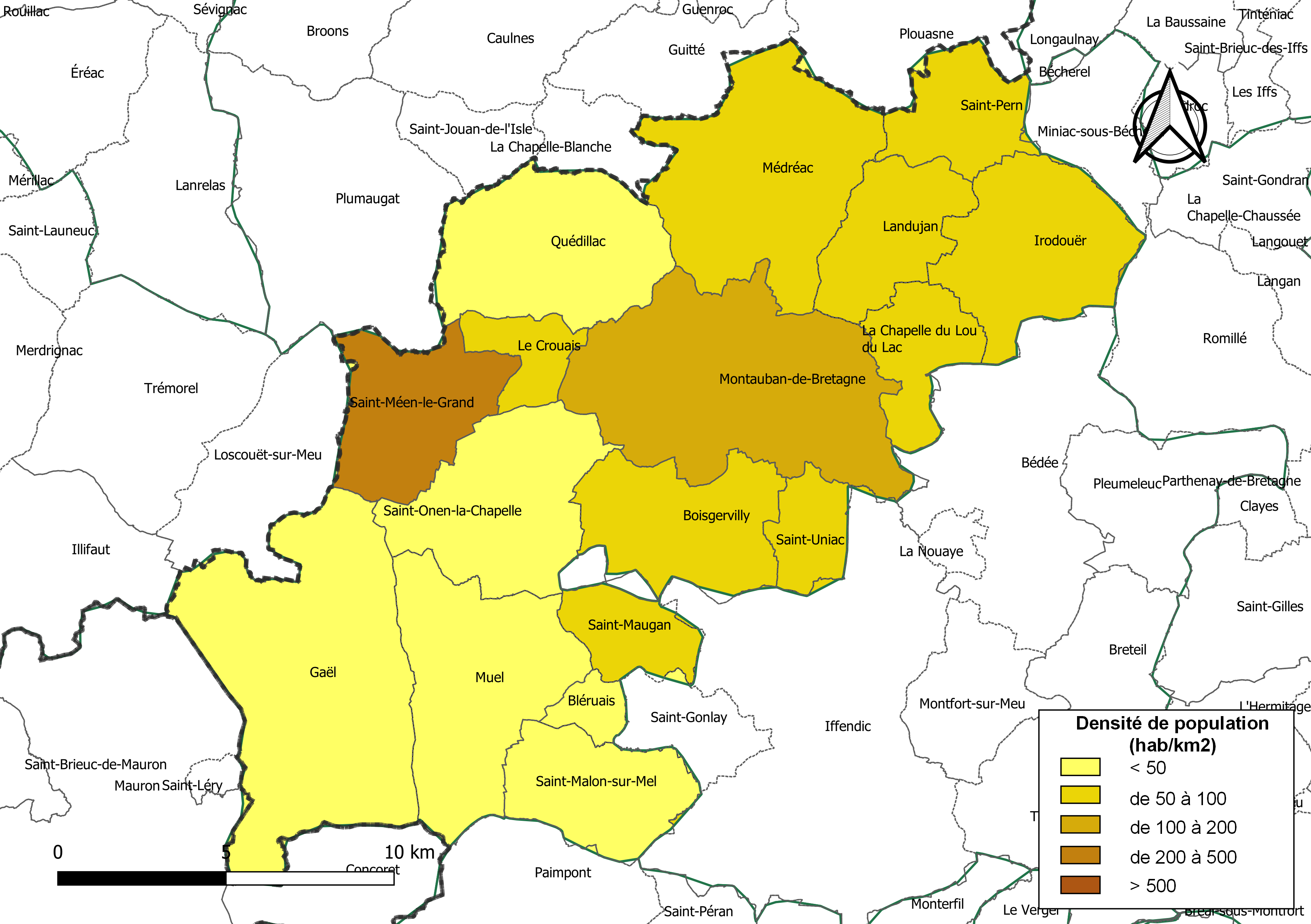 Carte des densités de population (millésimée 2016) des communes de la Communauté de communes de Saint-Méen Montauban, département d'Ille-et-Vilaine, France. Composition au 1er janvier 2019.